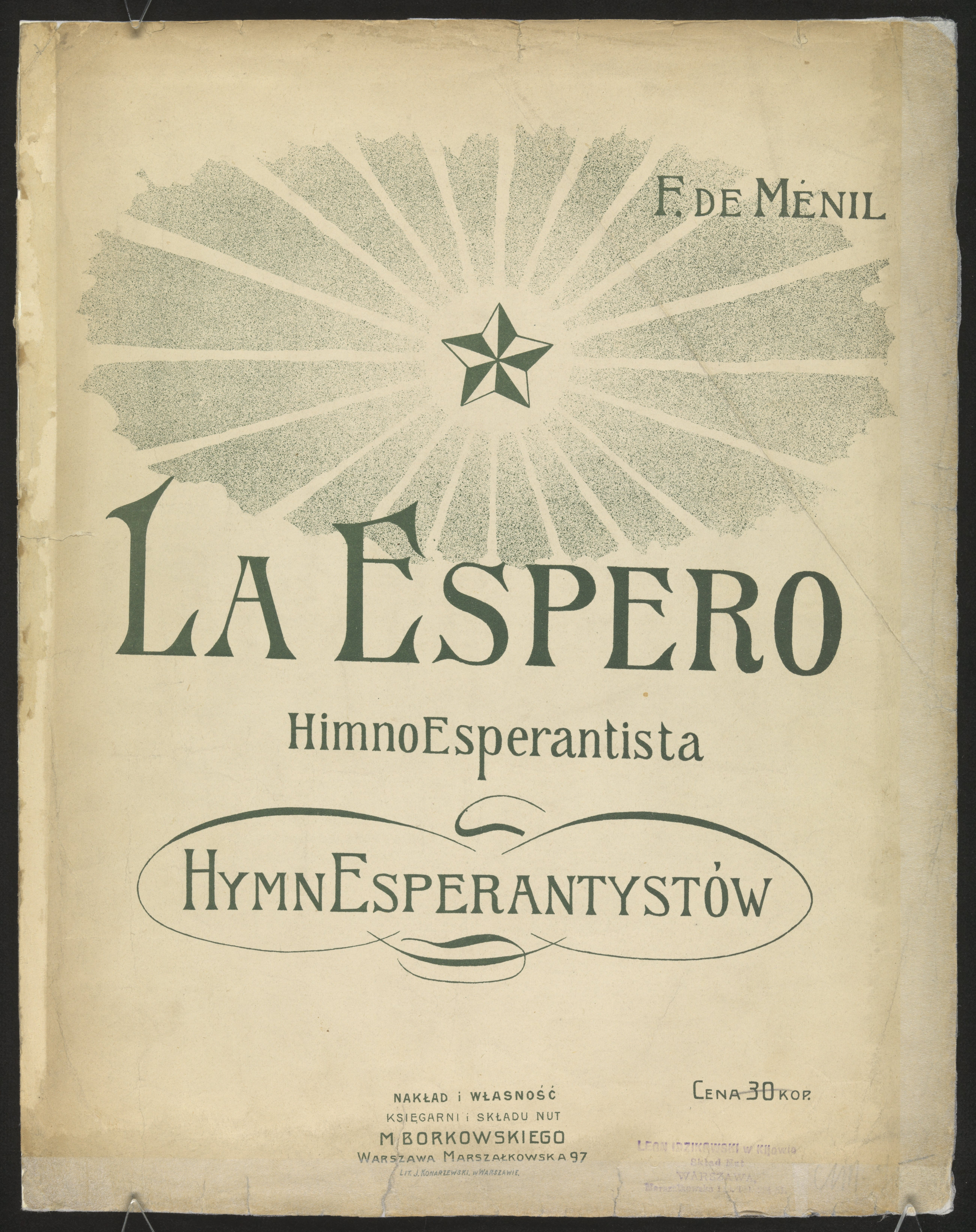 La Espero : Himno esperantista. Partituro, pola kaj esperanta tekstoj de la himno. Varsovio, eldonejo de M. Borkowski